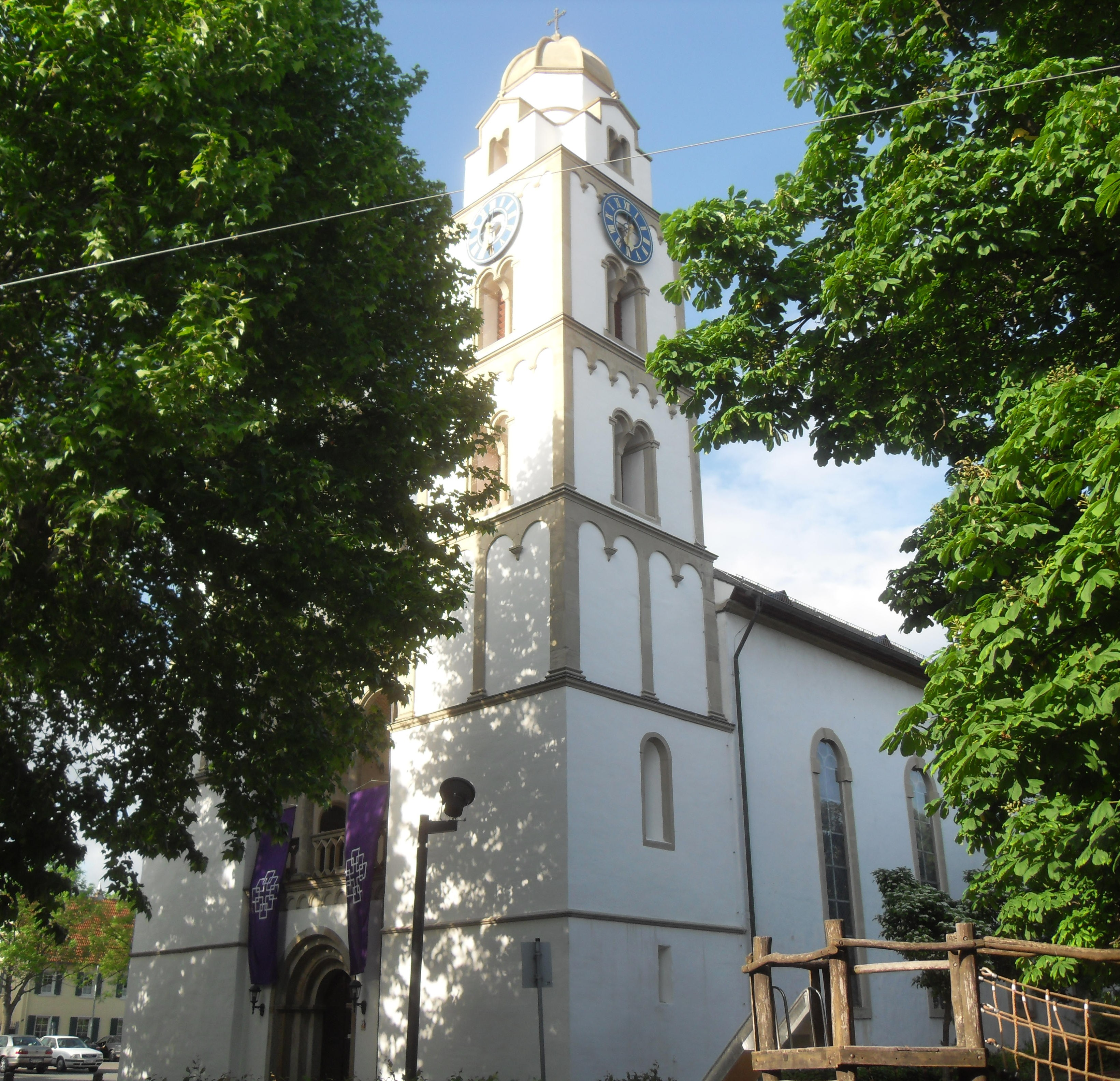 Der Südturm mit der Turmuhr der Guntersblumer evangelischen Kirche in Rheinhessen in Rheinland-Pfalz (Deutschland)